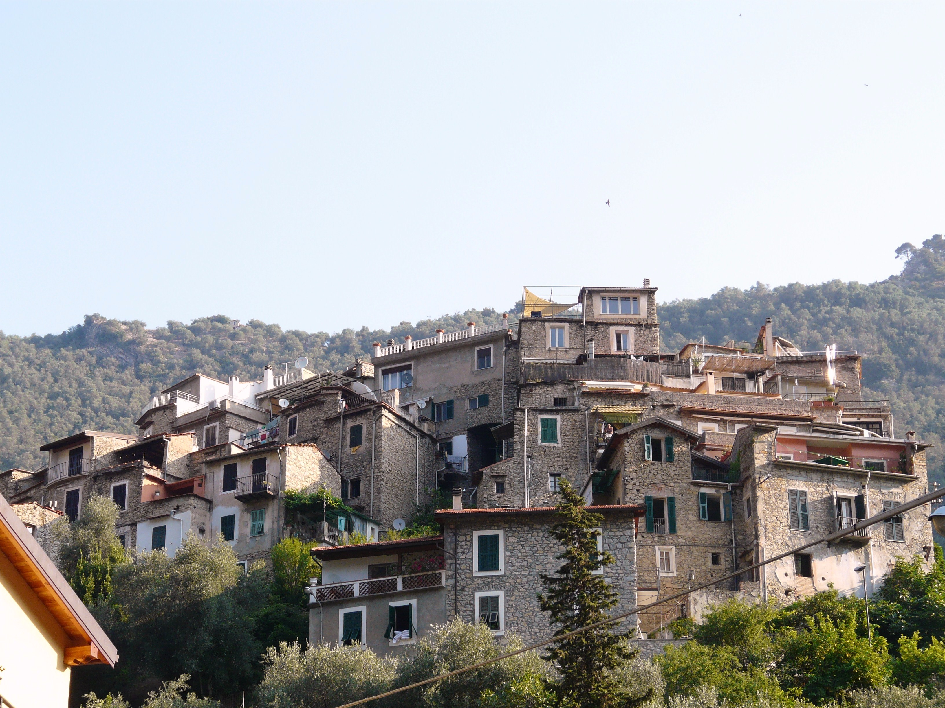 Airole, Liguria, Italia